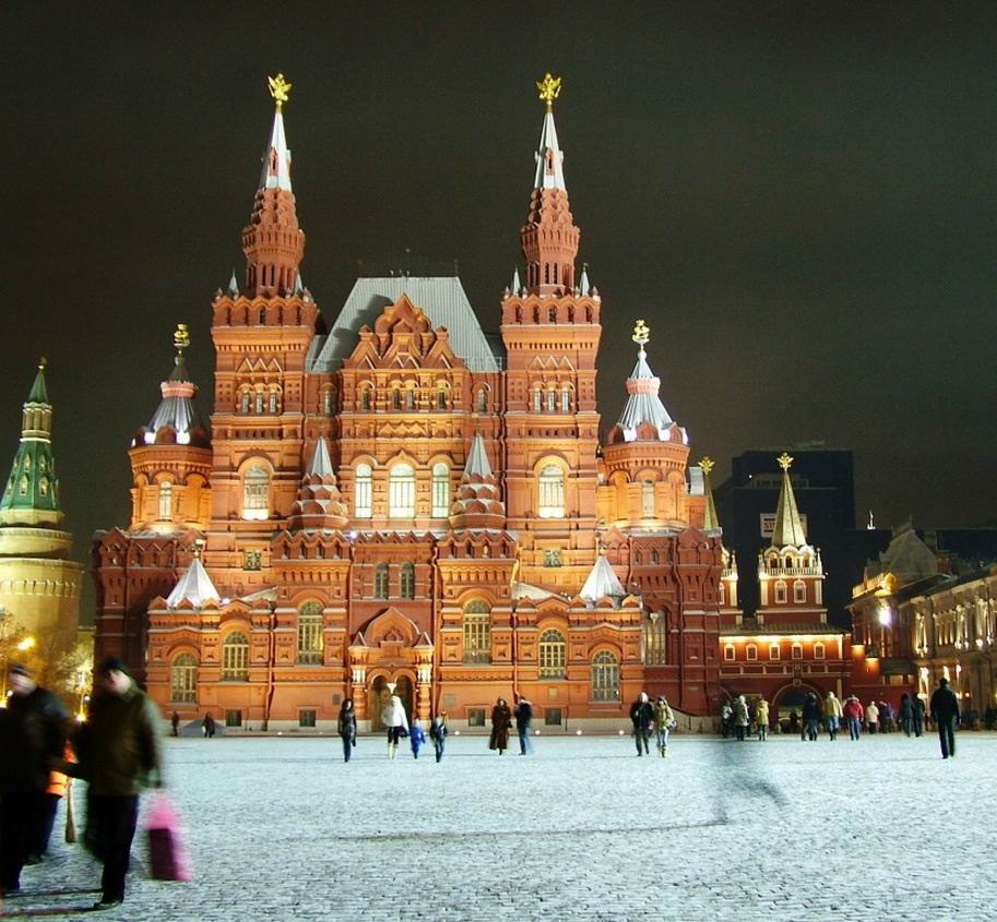 Nemzeti Történeti Múzeum a Vörös tér felől